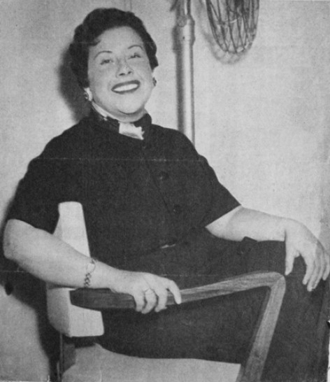 Fotografía de la cantante de tangos uruguaya Nina Miranda. En la portada rezaba el sobreimpreso "Nina Miranda. La estrella rioplatense del tango y artista de LR4 Radio Splendid".